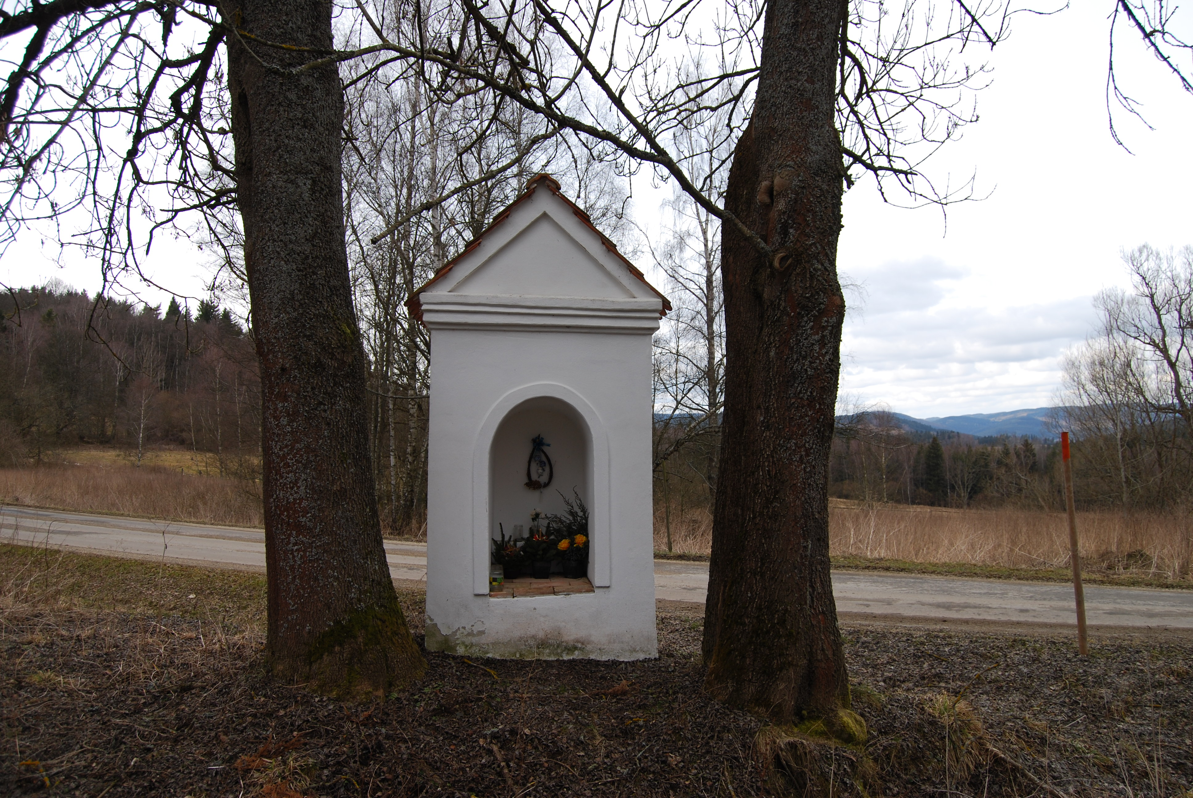 Výklenková kaple u silnice 14136. Cudrovice (německy Zuderschlag) jsou zaniklá osada v okrese Prachatice, 5 km jižně od obce Záblatí. Okres Prachatice. Česká republika.